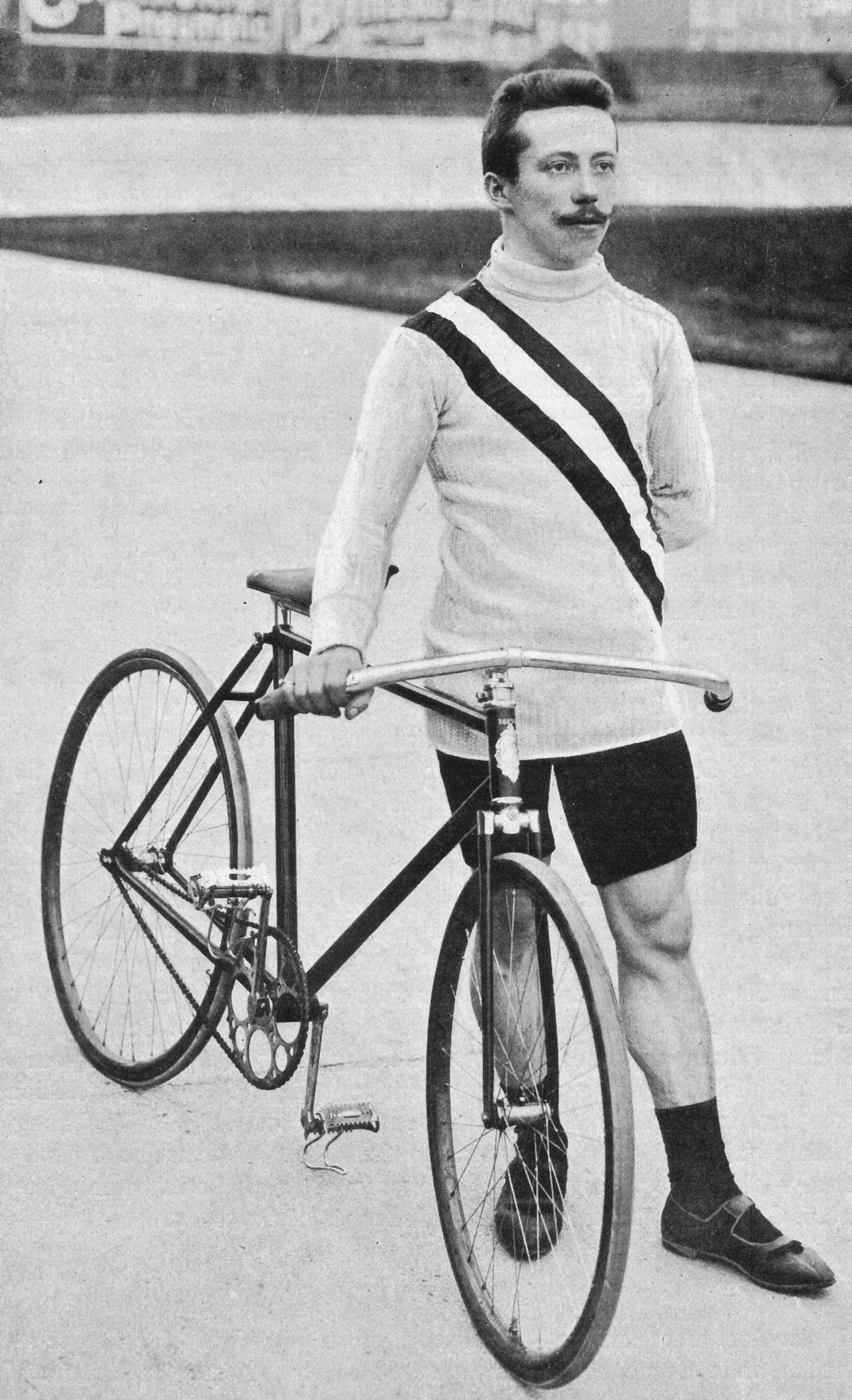 Alred Görnemann (1887-1903)